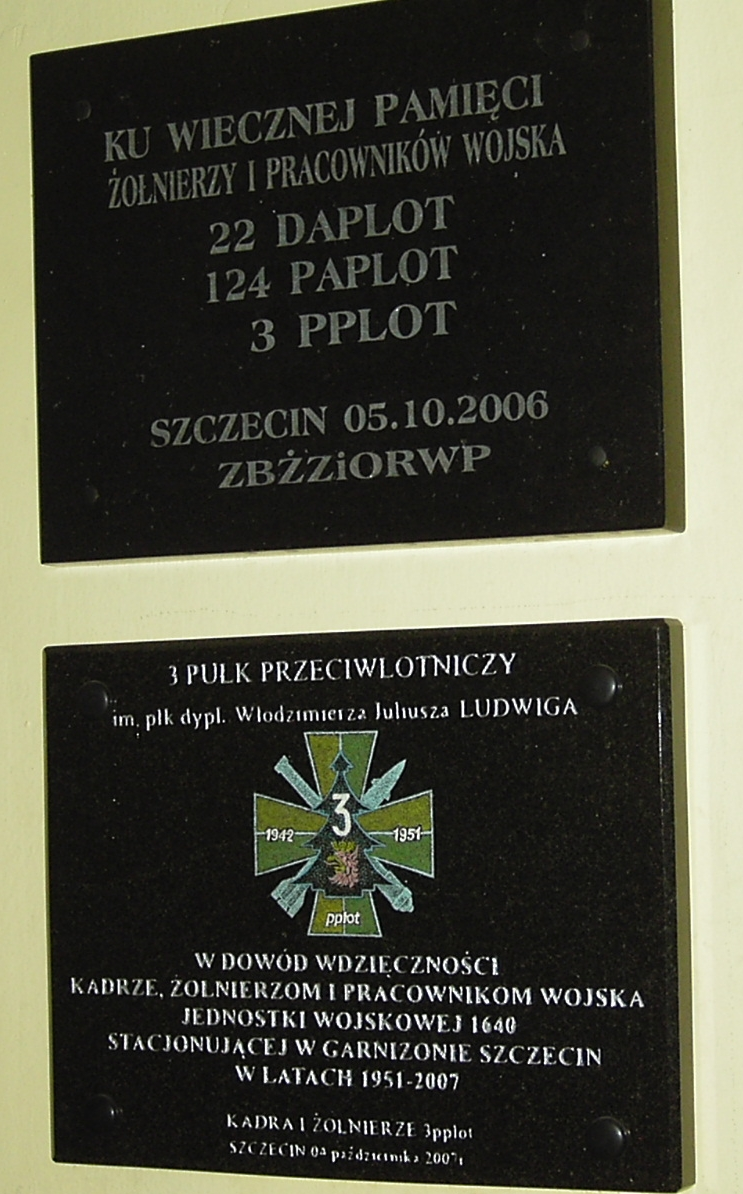 Tablica 3 pułku przeciwlotniczego w kościele garnizonowym w Szczecinie